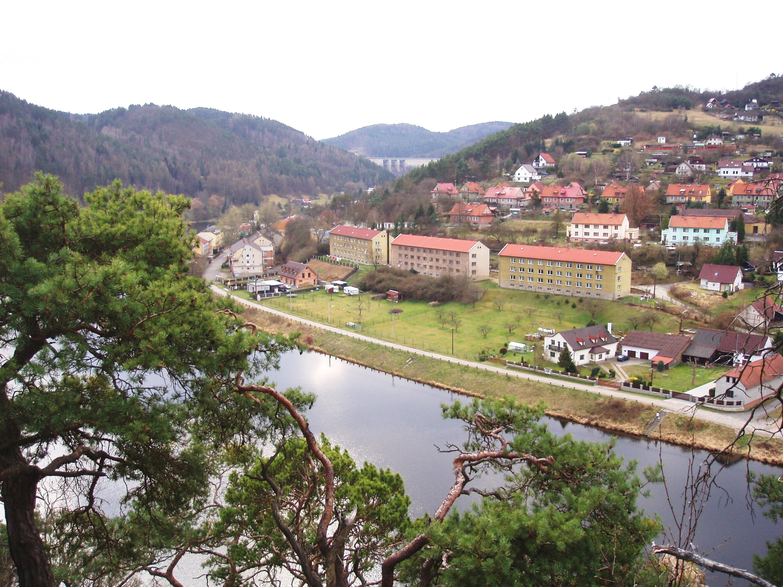 Solenice z vrchu Varta